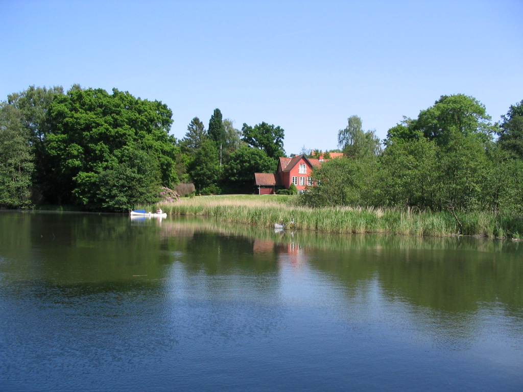 Fuglevad Møllesø